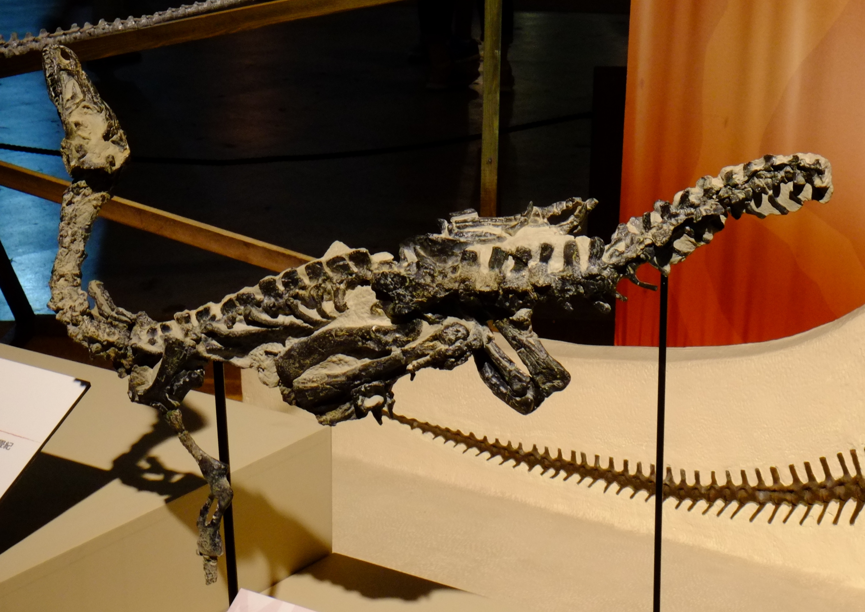 産状骨格なのに浮いてる。